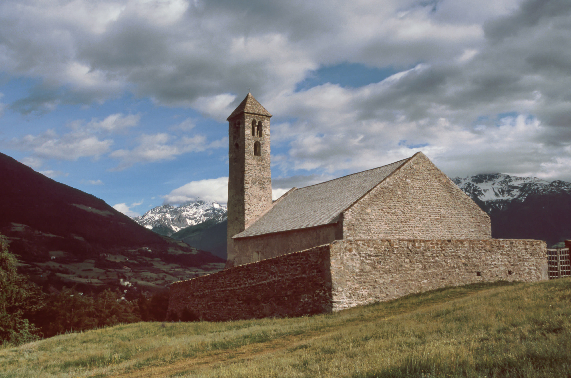 St. Veit auf dem Tartscher Bichl, Vinschgau, Südtirol 2009; Gescanntes Dia